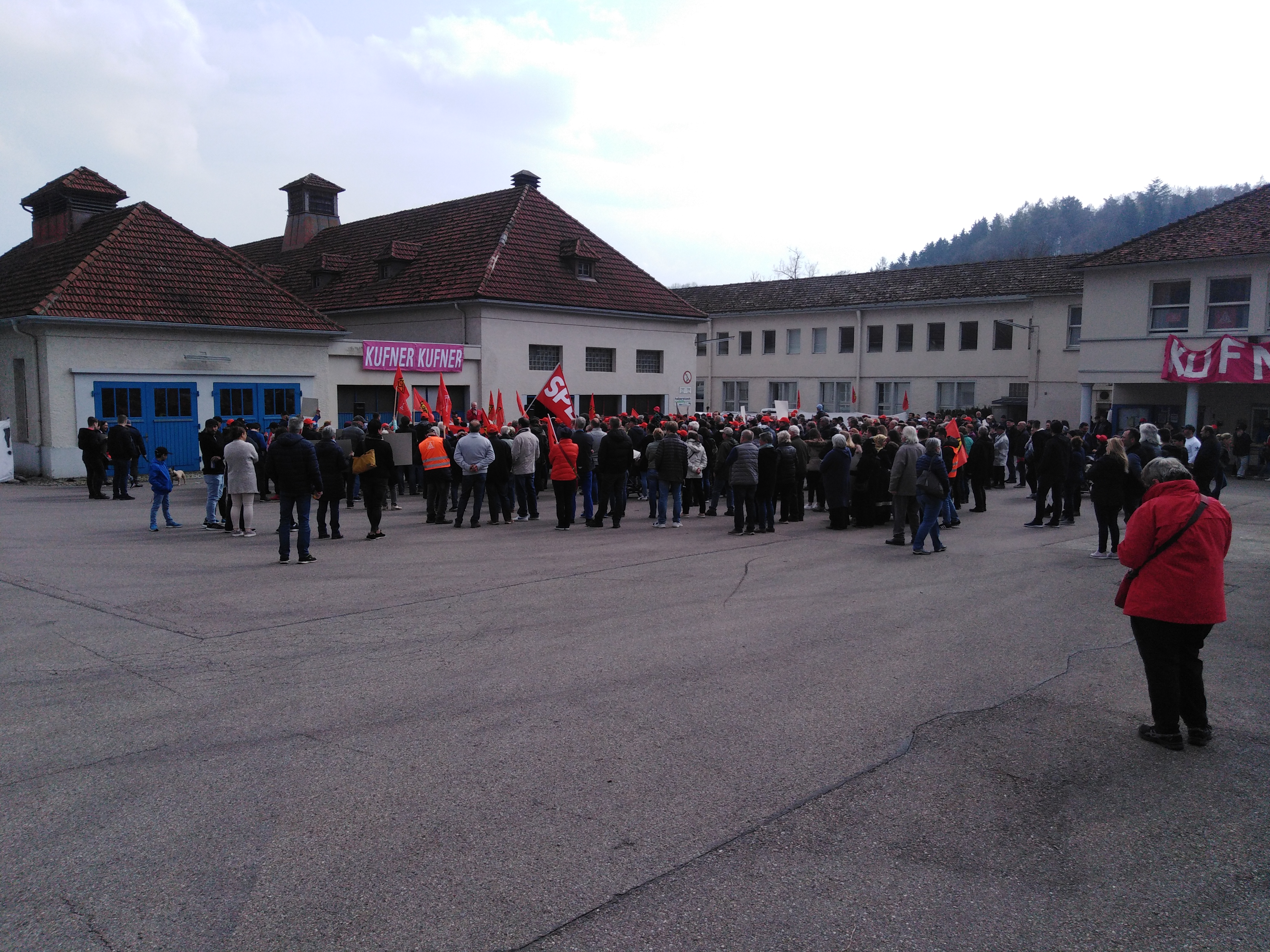 LM Firma Lauffenmühle in Lauchringen. Kundgebung nach angekündigter Betriebsschließung am 13. April 2019.